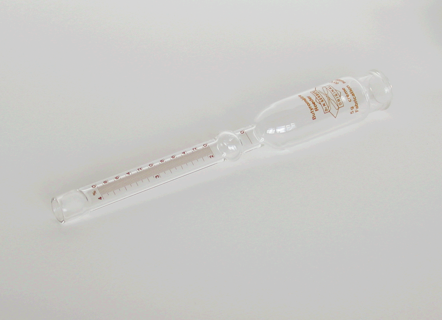 Butyrometer nach Roeder